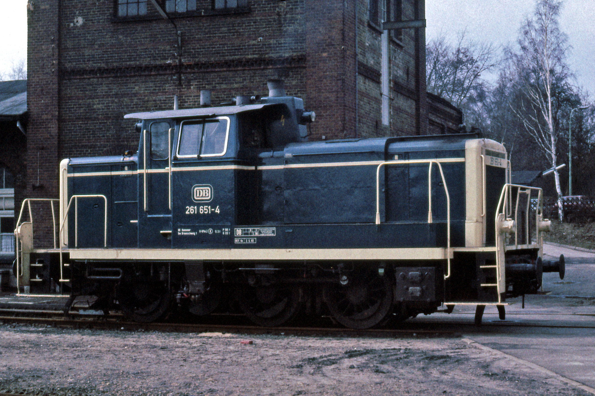 Diesellokomotive der Baureihe 261 am ehemaligen Betriebswerk an der Westseite des Bahnhofes Uelzen.